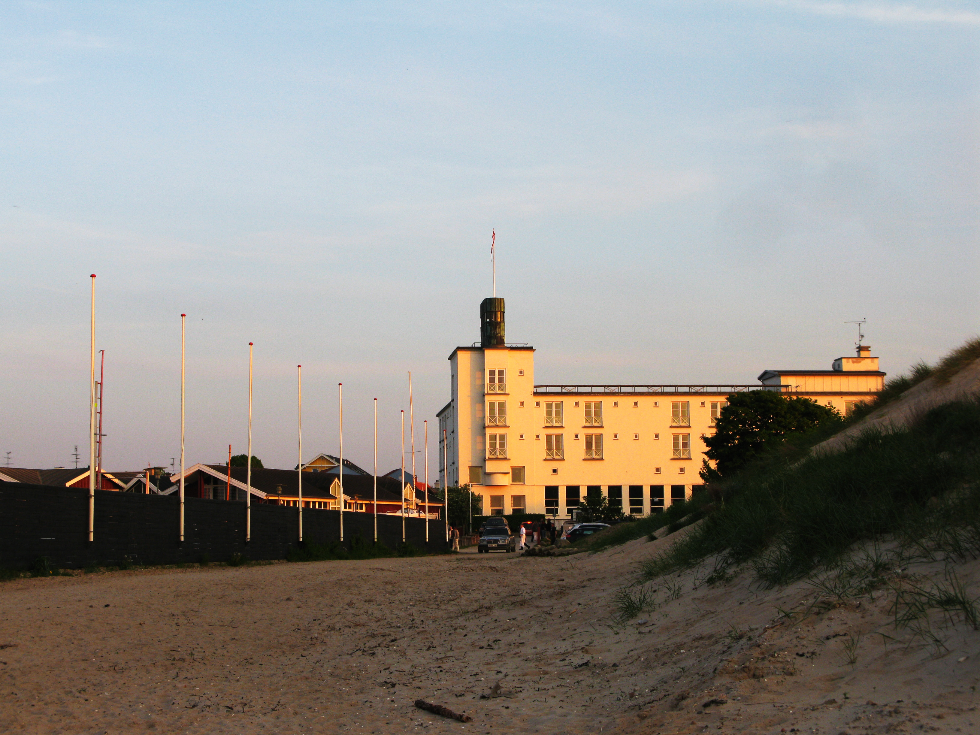 Fysiurgisk Hospital, Hornbæk